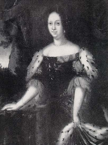 Erdmuthe Sophie von Sachsen, 1. Frau von Christian Ernst